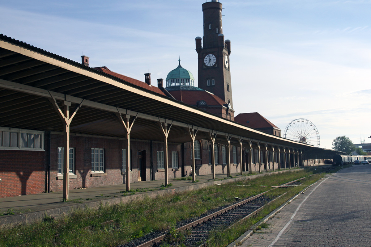 Amerika-Bahnhof Cuxhaven (Hapag-Hallen) 2010